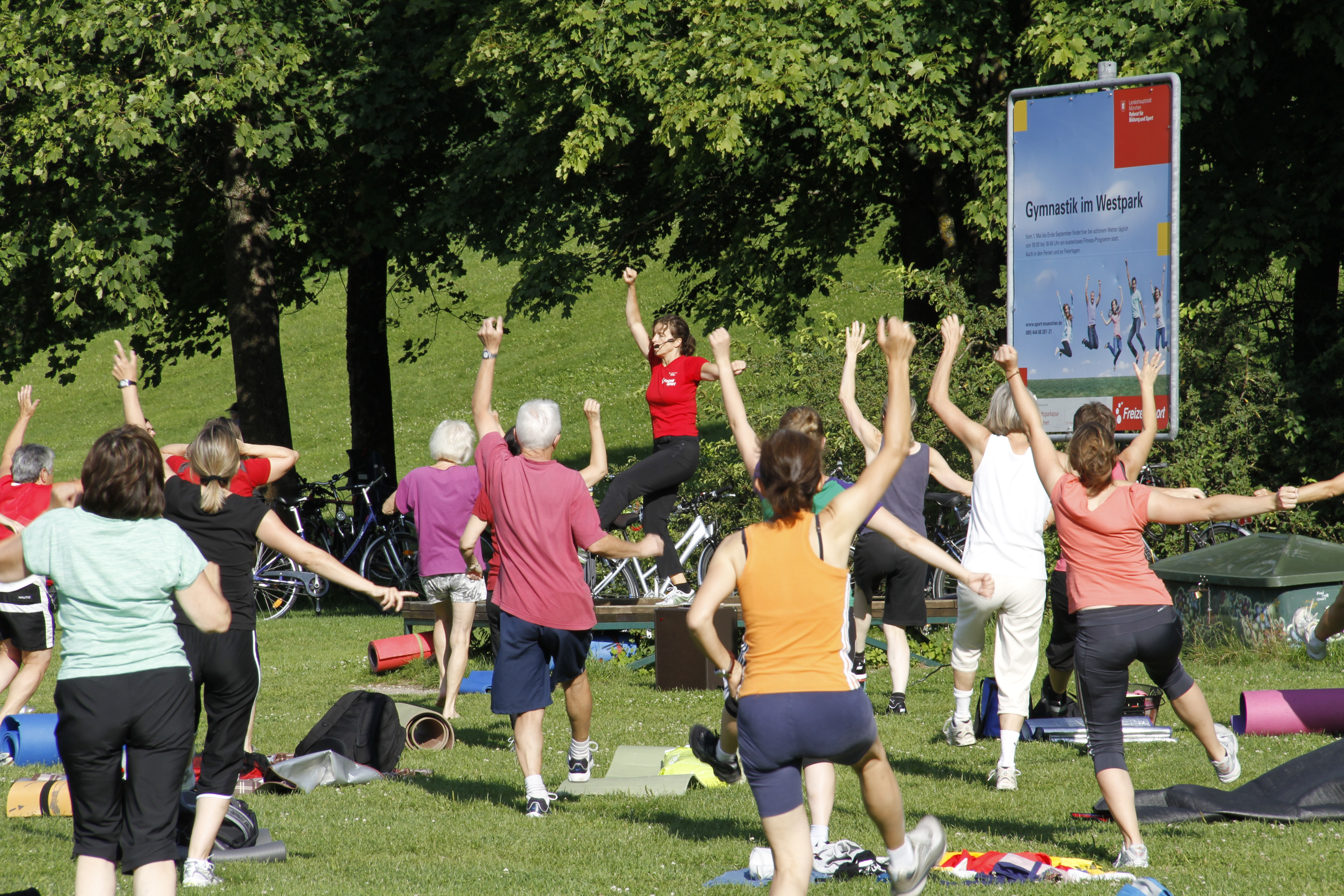 Öffentliches Gymnastikprogramm im Westpark, München. Im Sommerhalbjahr findet eine tägliche öffentliche Sportveranstaltung und ein zusätzliches Training am Sonntag Morgen statt.